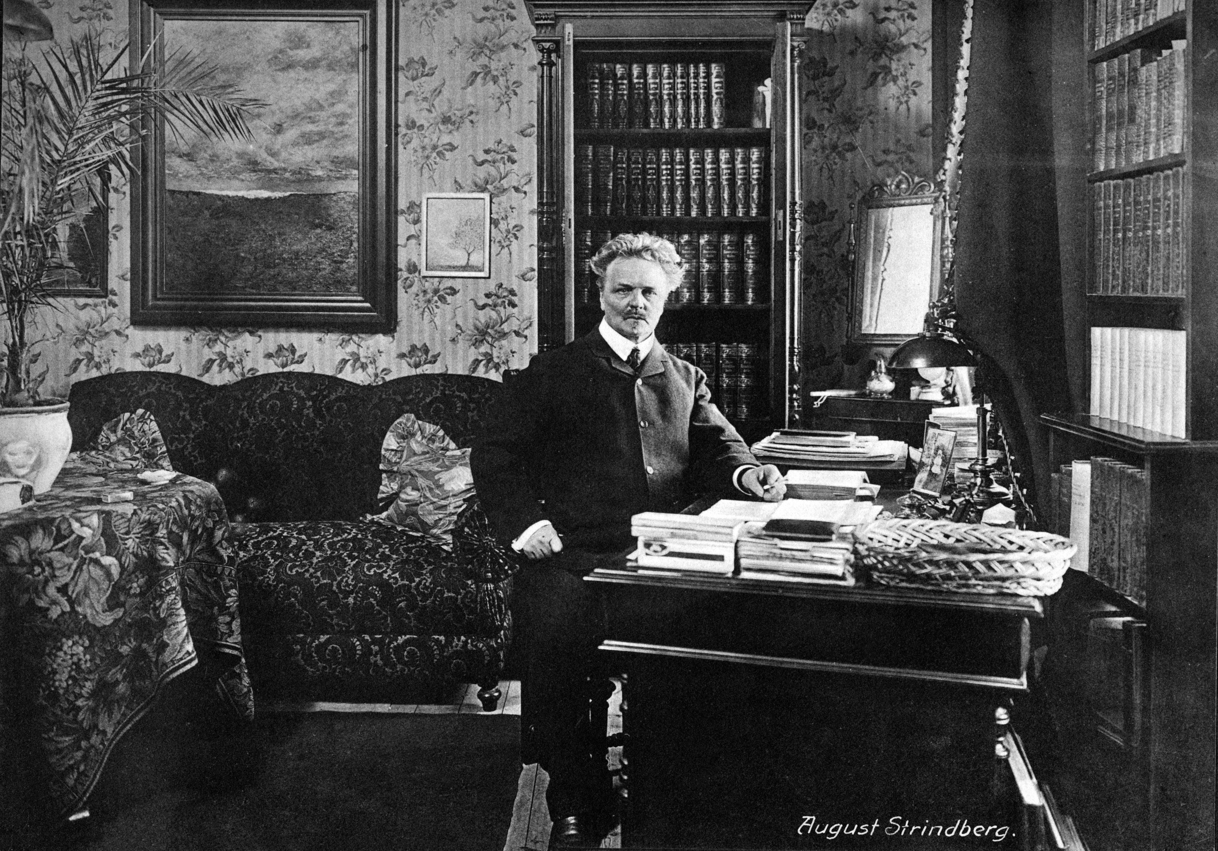 Strindberg fotograferad för häftet "Hos svenska författare och konstnärer", cirka 1912